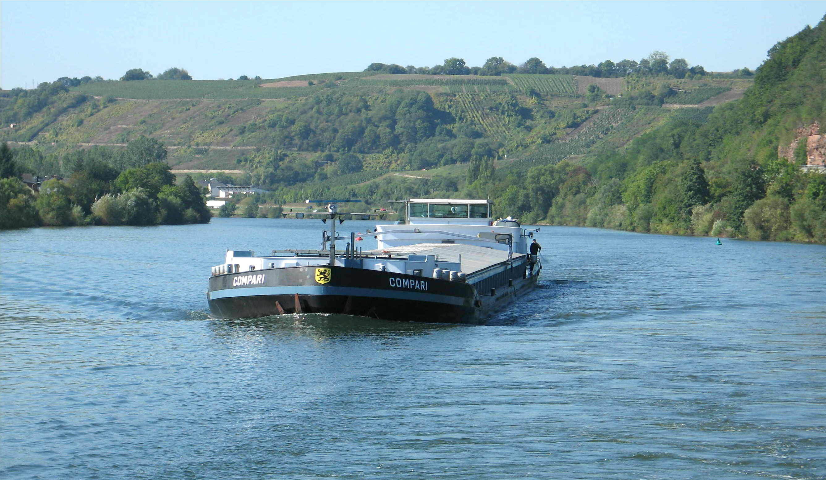 Schëff op der Musel bei Wasserliesch